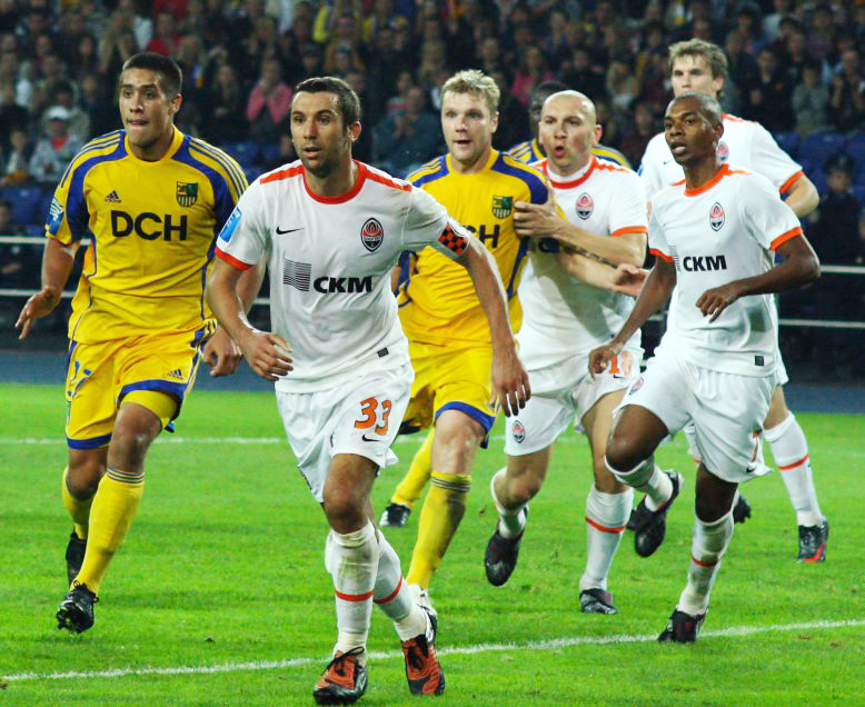 Джонатан Майдана, Дарио Срна, Валентин Слюсар, Мариуш Левандовски, Фернандиньо и Александр Гладкий